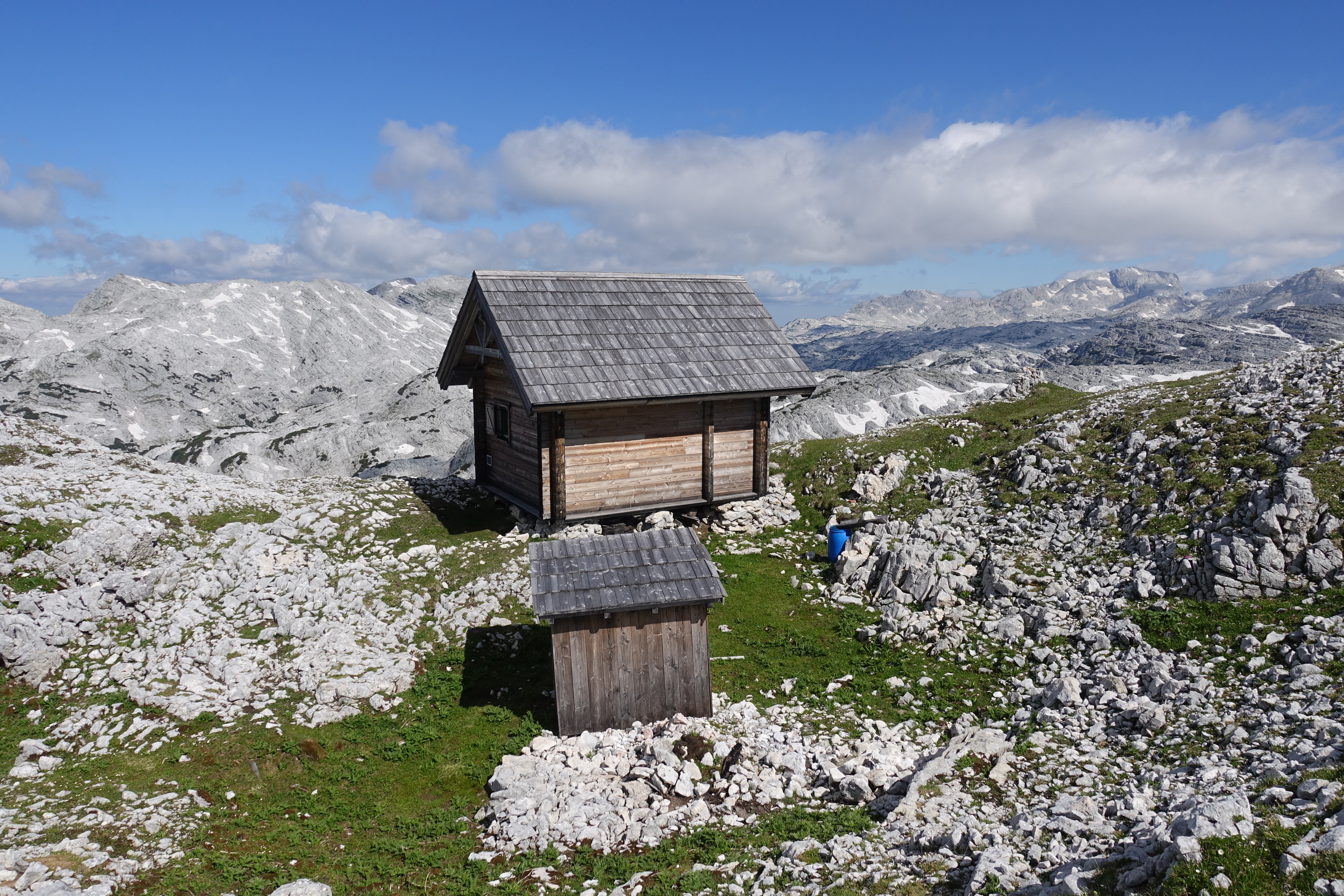 Jagdhütte am Bartlrücken, Totes Gebirge, Österreich; Naturschutzgebiet Totes Gebirge Ost (NSG 17 a) This media shows the nature reserve in Styria with the ID NSG 17 a.